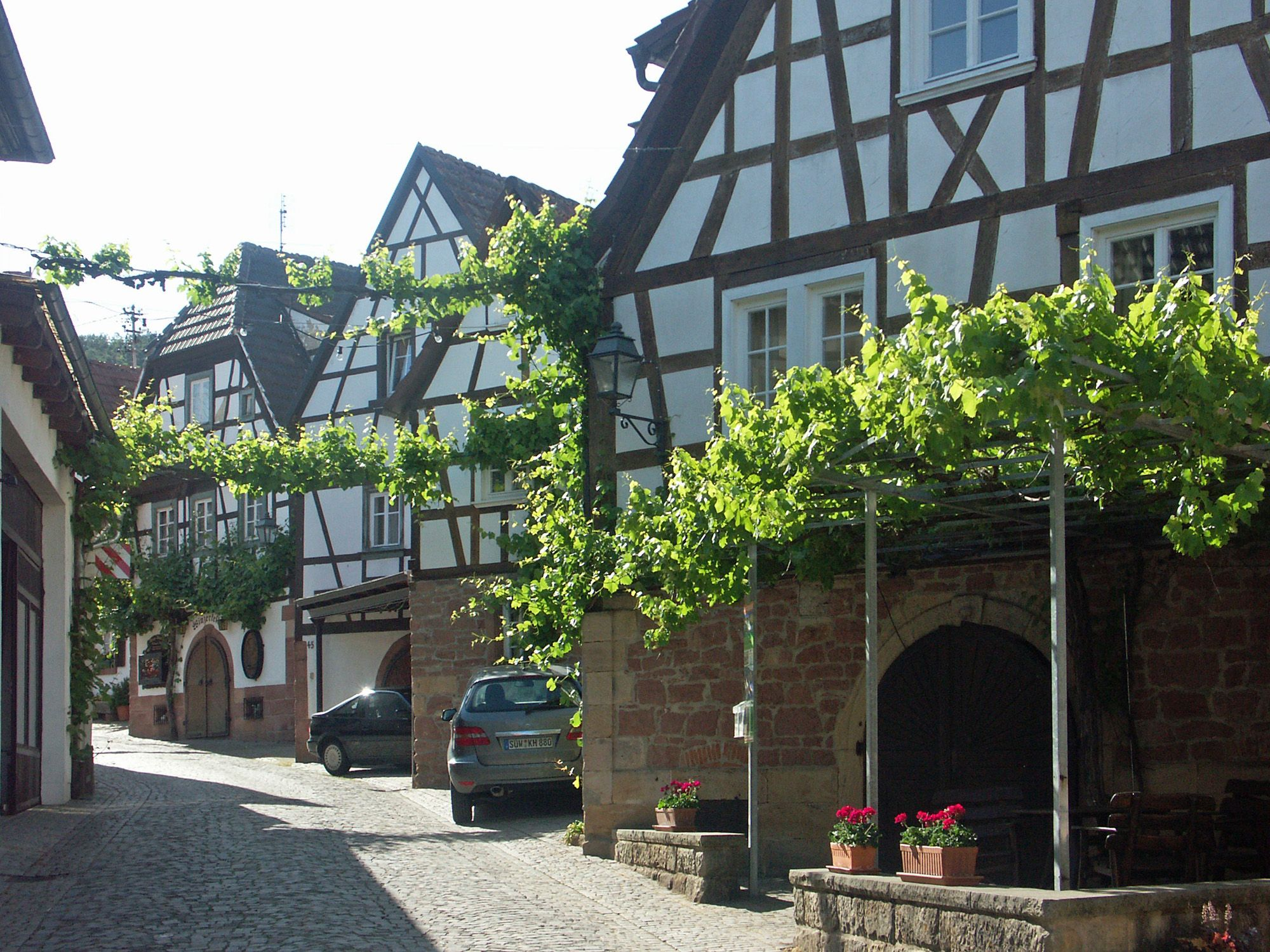 Die Winzegasse in Gleiszellen